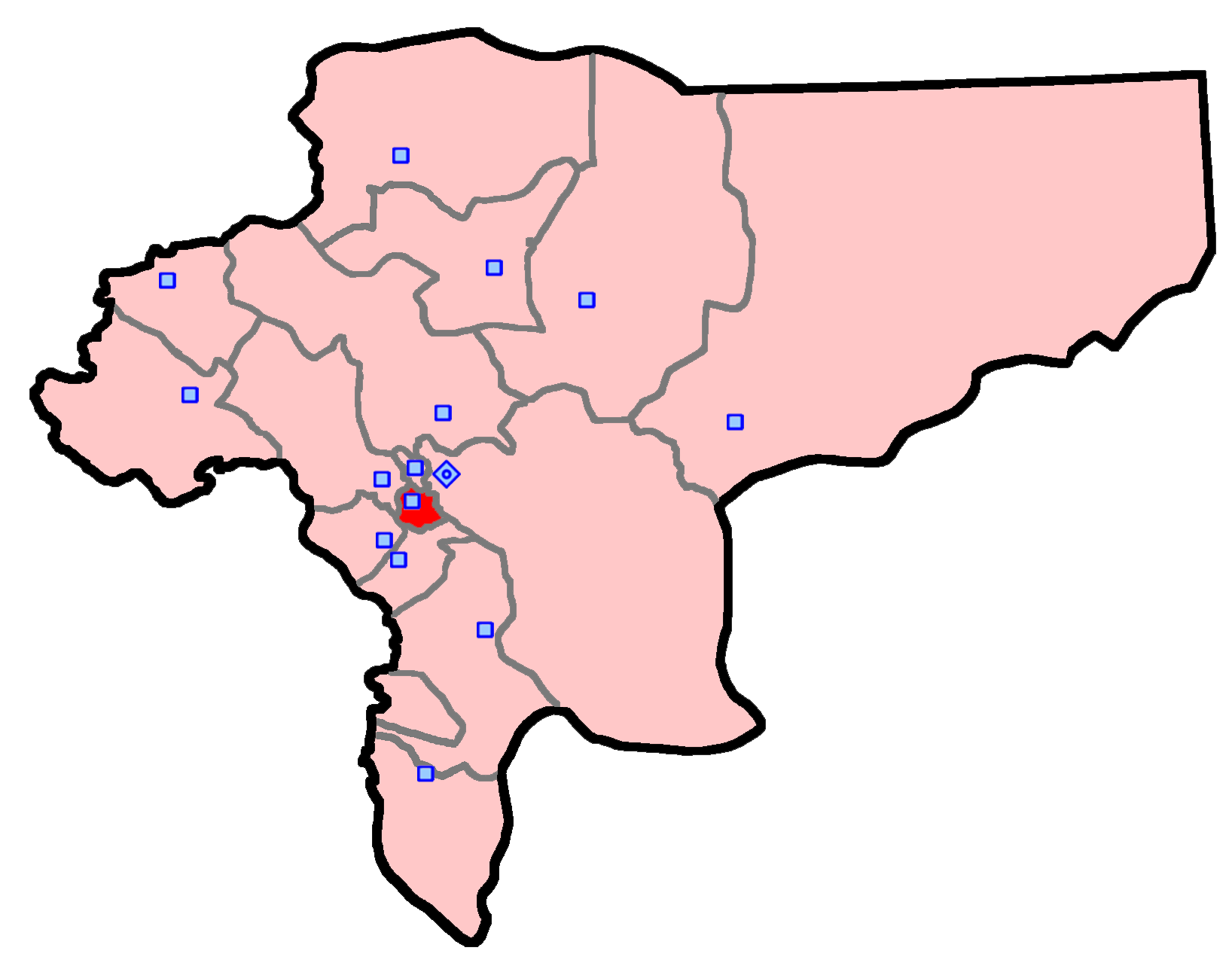 حوزهٔ انتخاباتی فلاورجان برای انتخابات مجلس شورای اسلامی